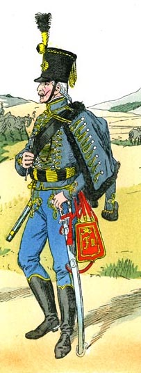 Husar des Kroatisch-Slawonischen Grenz-Husaren-Regiments